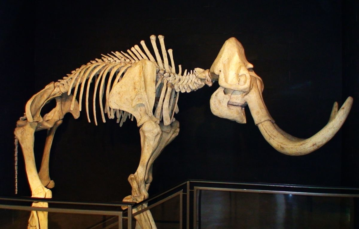 Urmensch-Museum Steinheim an der Murr, Badenwürttemberg - Elefant